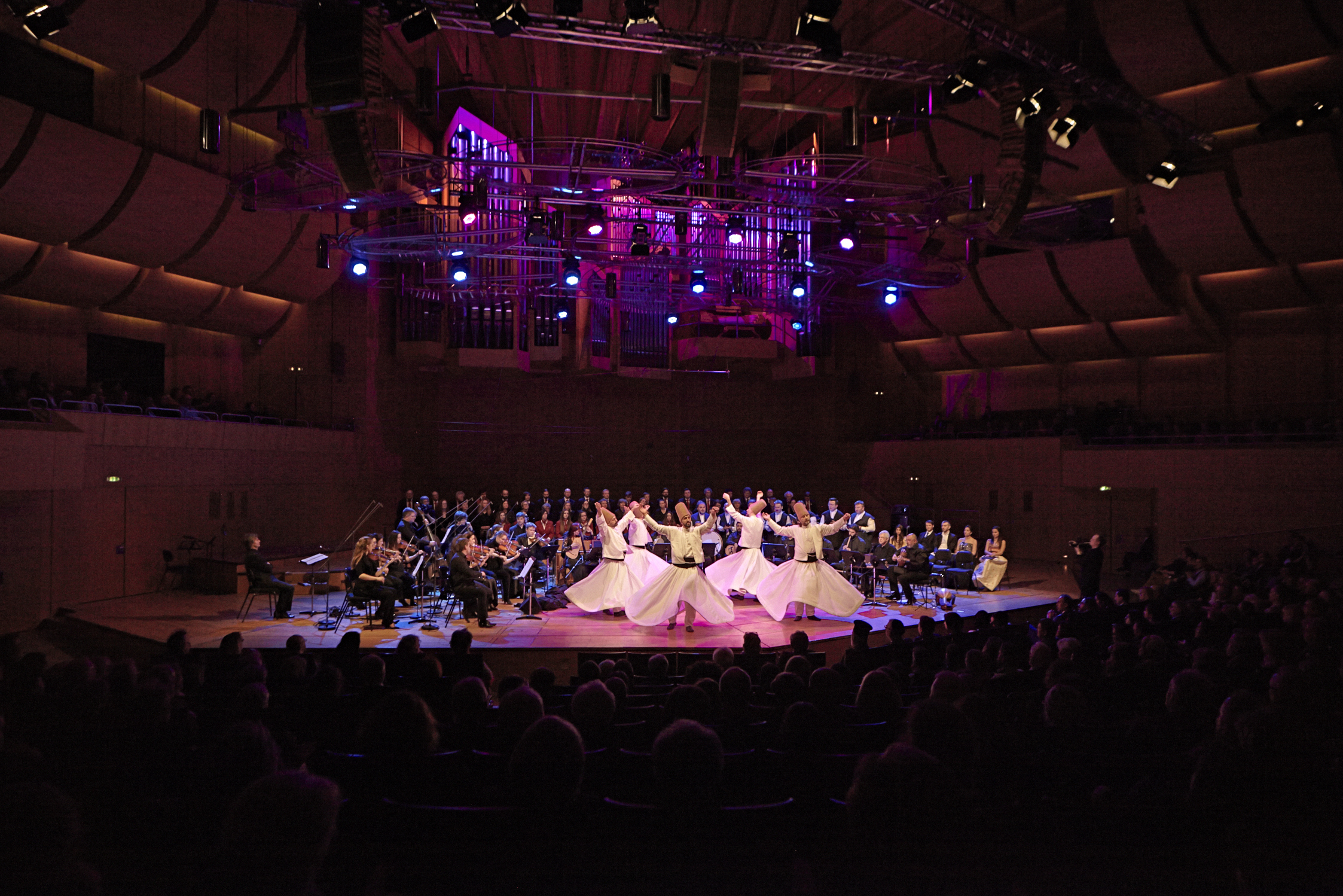 Philharmonie München 18. 3. 2017. Music for the One God